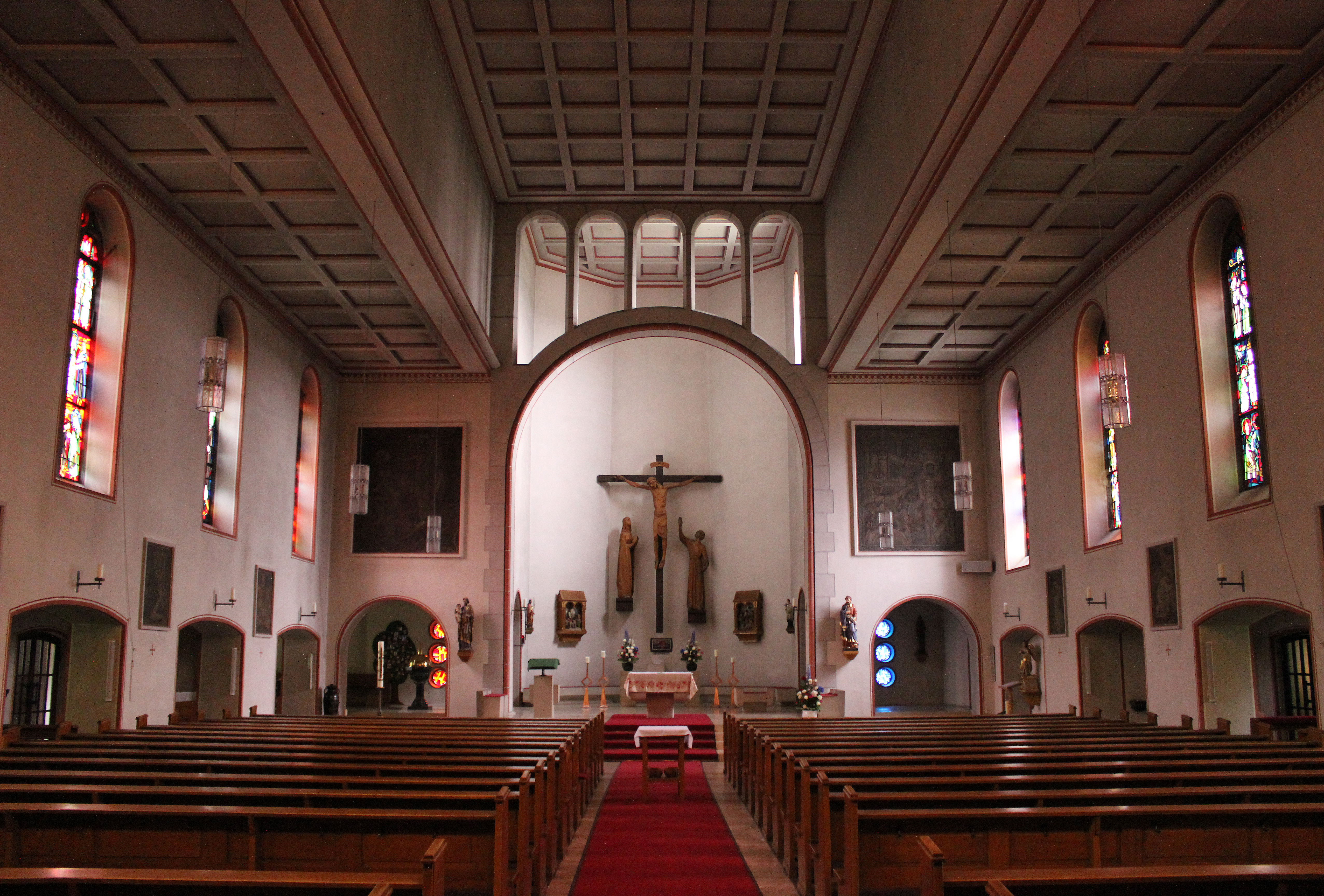 Blick ins Innere der katholischen Pfarrkirche St. Peter in Bous, Landkreis Saarlouis, Saarland